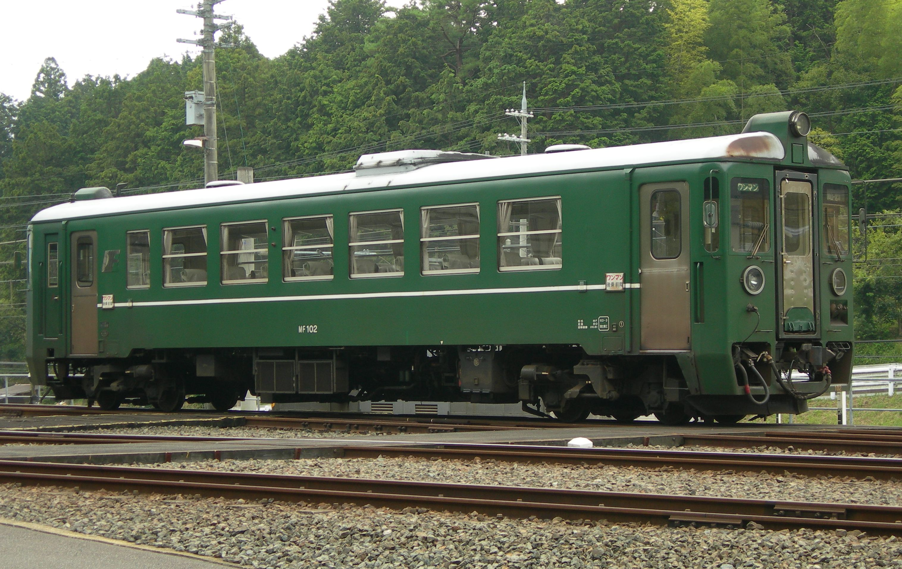 北近畿タンゴ鉄道MF100形気動車(福知山運転支区にて)